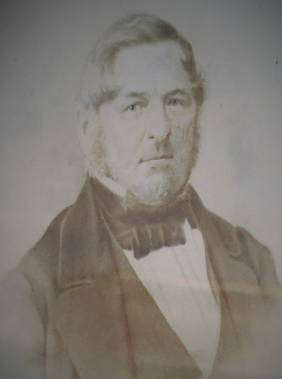 Rudolf Stapfer, Lehrer und Politiker, Horgen ZH, Schweiz